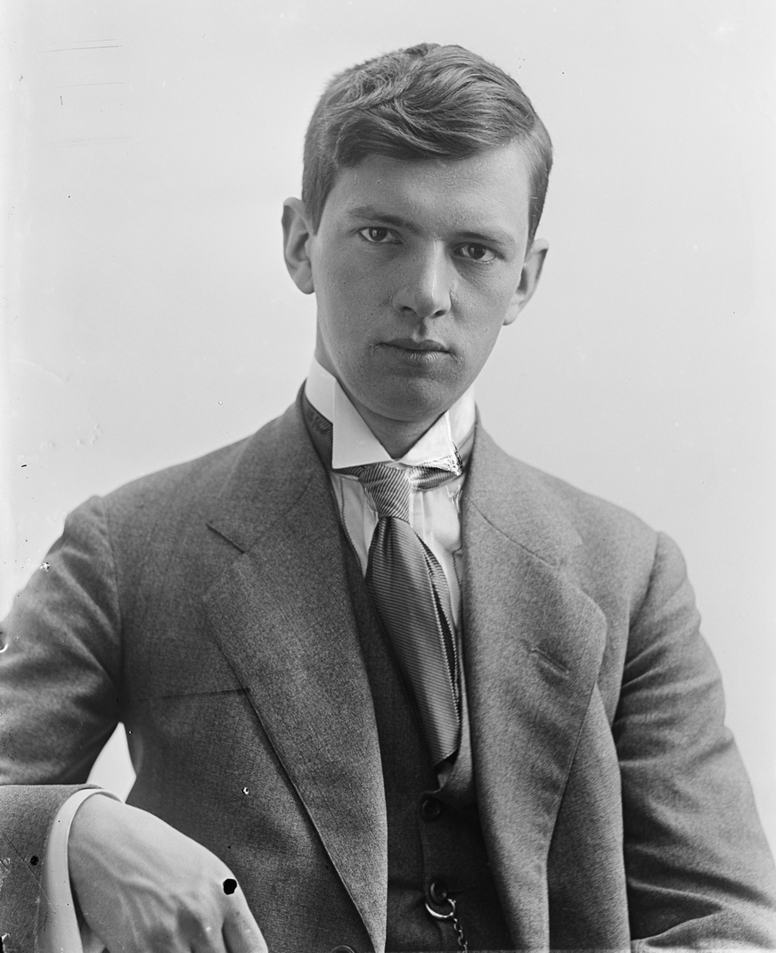 Eyvind Getz, advokat og politiker.